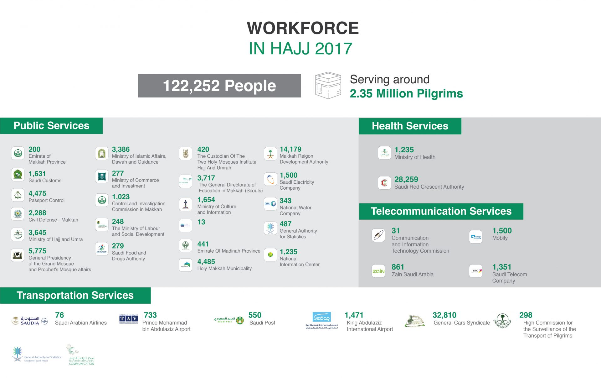 Infographic about Hajj 2017 Workforce published by Center for International Communication